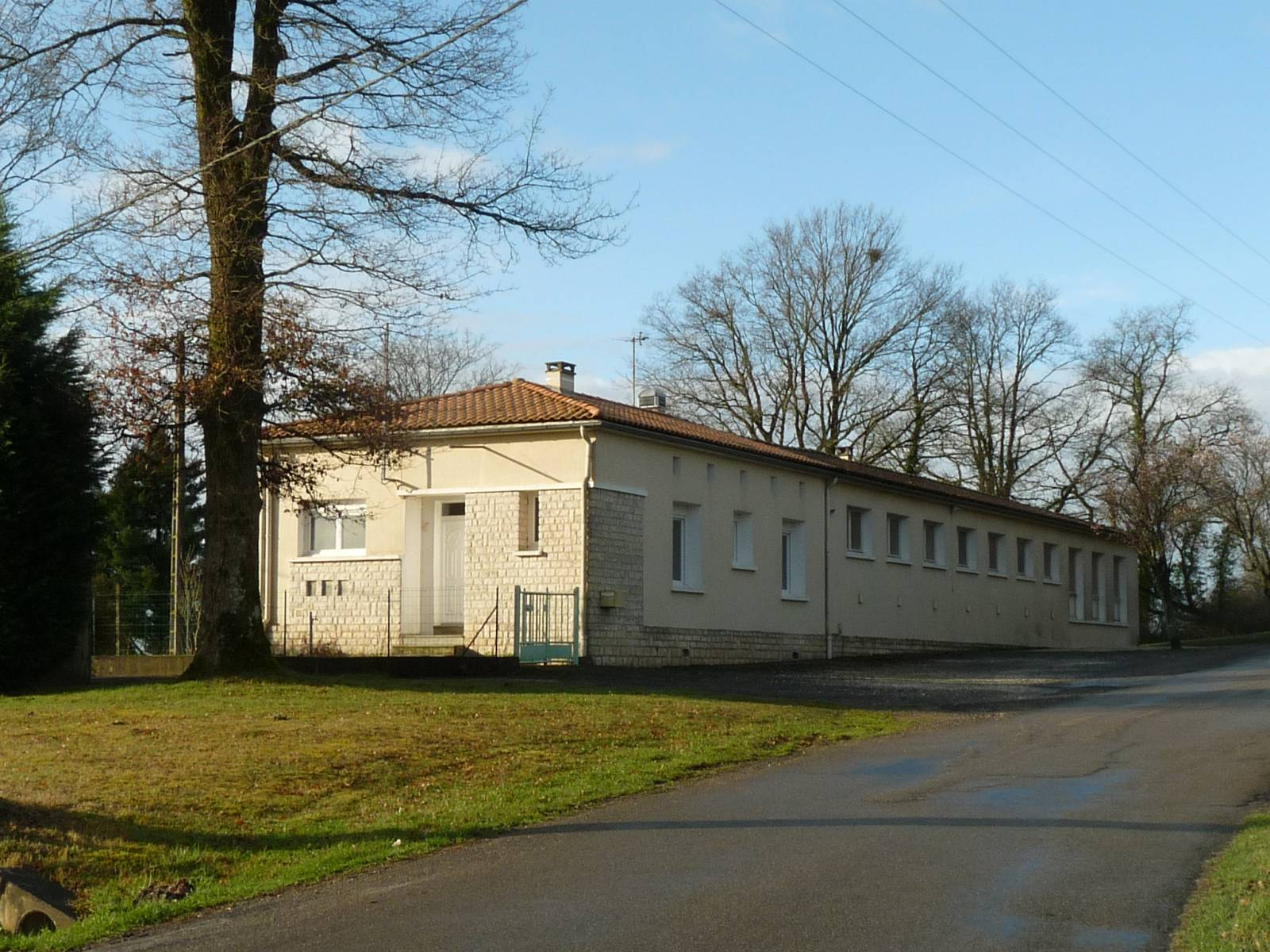 salle des fêtes de Mazerolles (Charente, France) située au Mas